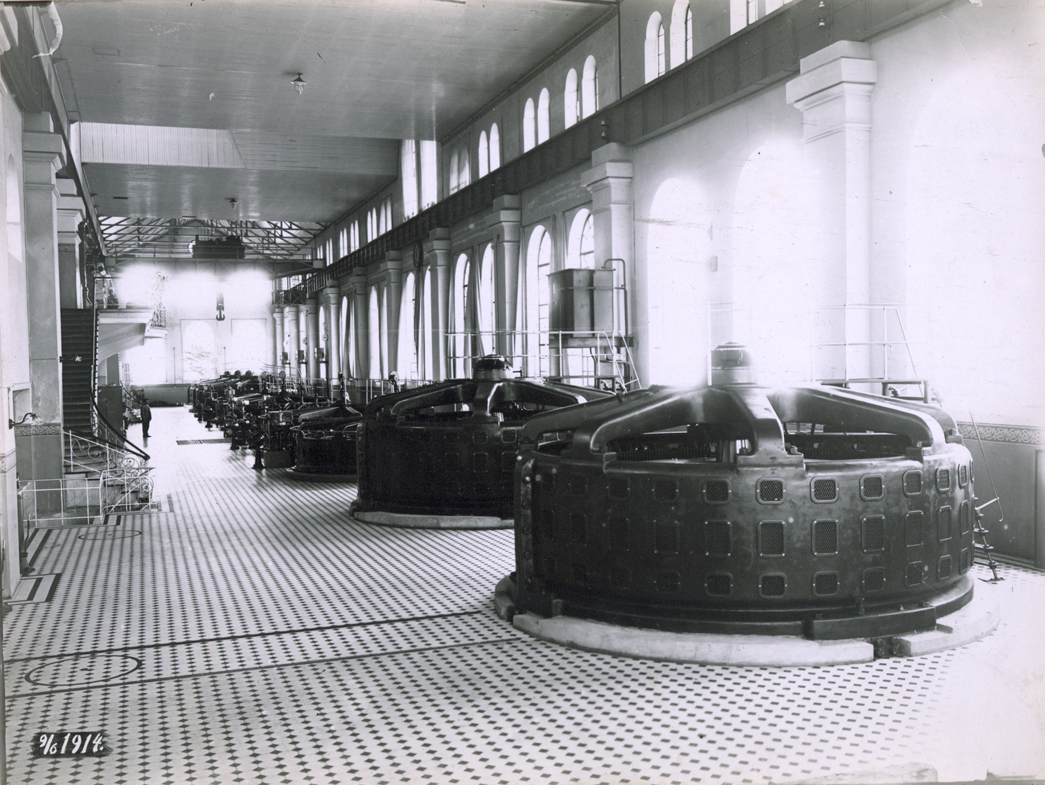 Kykkelsrud kraftstasjon (AS Hafslund). Interiør. Maskinsal. Elektrisitetsdirektoratet. Dato: 09.06.1914